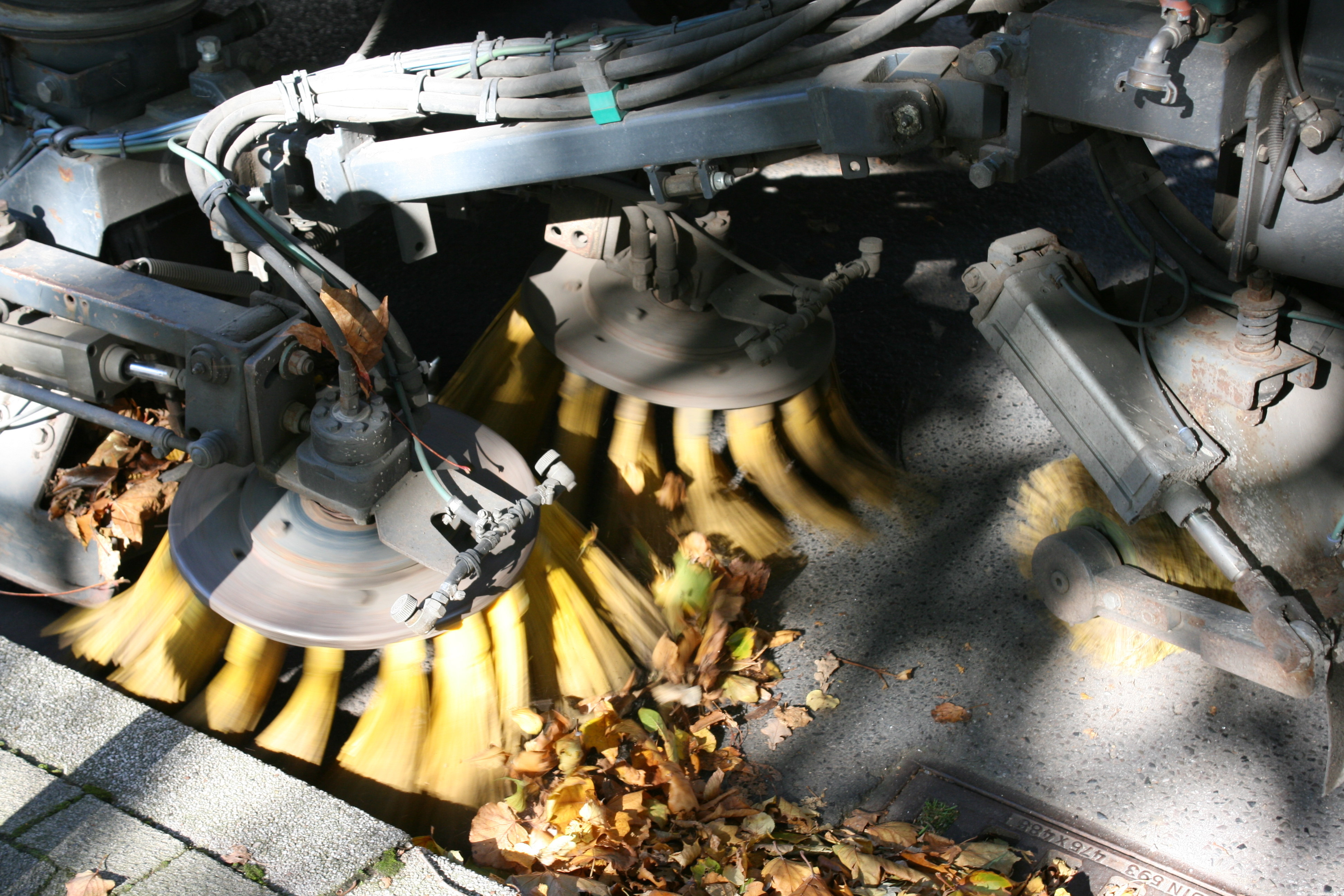 Ecke Schlossstraße / Kolpingstraße in Herten-Westerholt